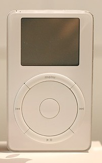 First generation iPod.